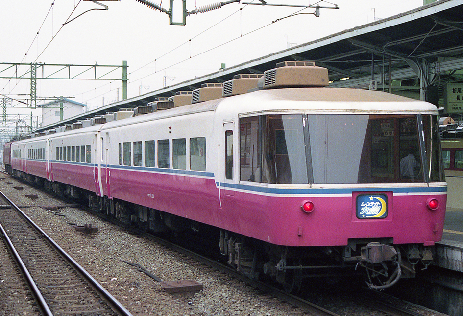 JR西日本 14系座席車 シュプール＆リゾート 「ムーンライト九州」オハフ15 201